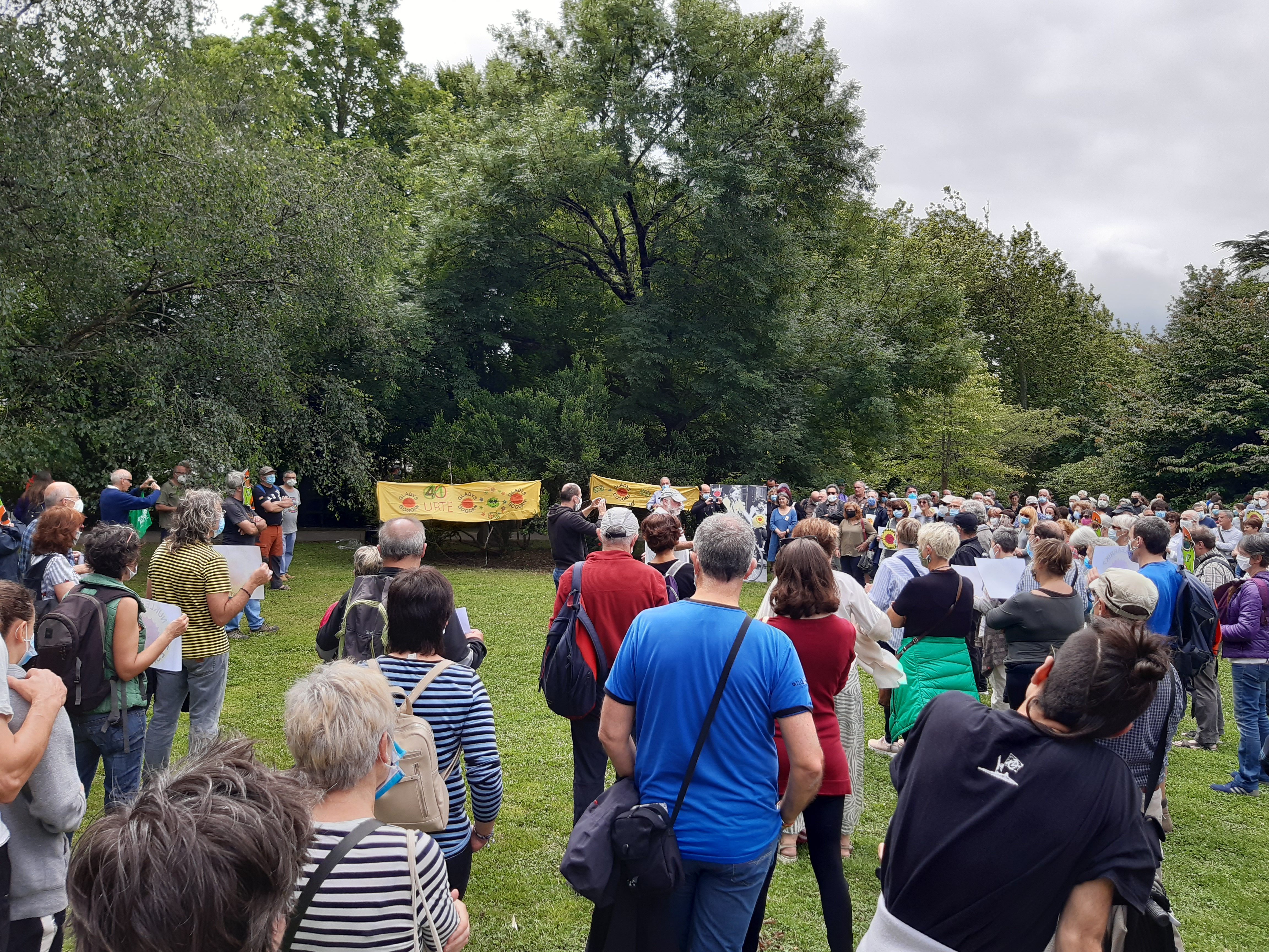 Gladys del Estalen omenezko ekitaldia (2020), Cristina Enea, Egia, Donostia